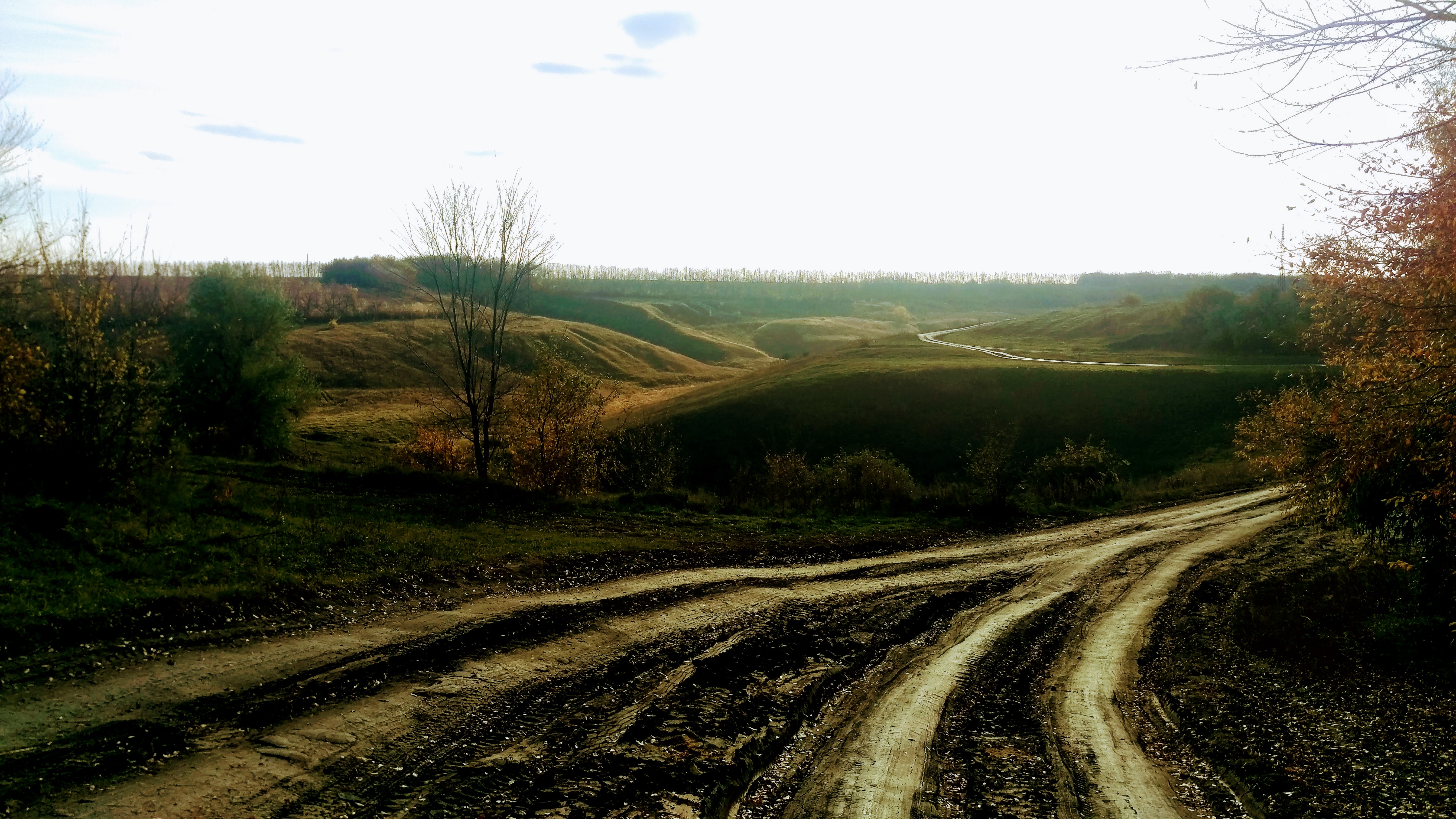 Балки на окраине Латная